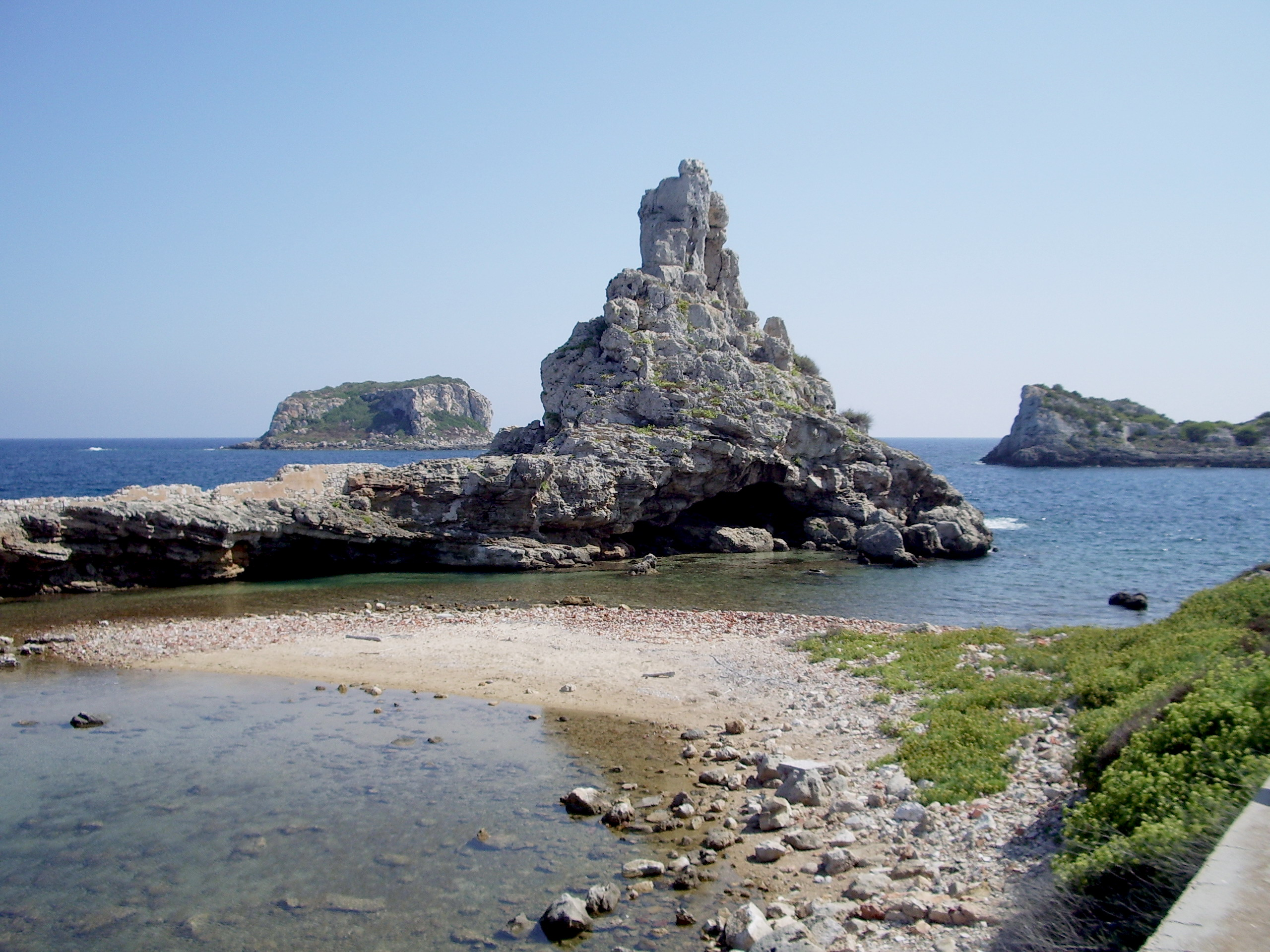 Lo Scoglio del Marzocco e l'Isola della Scola visti da Pianosa (LI)